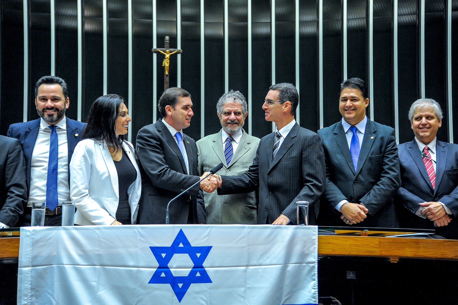 Sessão Solene em homenagem à criação do Estado de Israel, realizada pela Câmara dos Deputado. 19 de maio de 2016